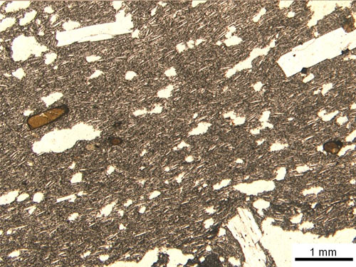 Basalto Tholeitico. nicol paralleli